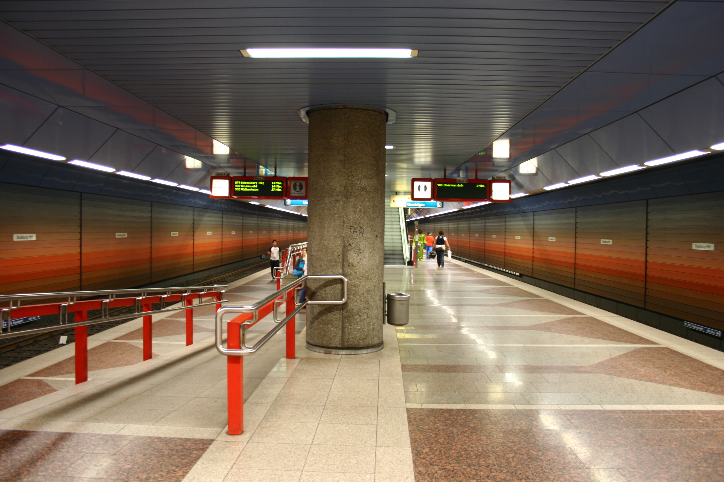 U-Bahnhof Duisburg Hbf der Stadtbahn Duisburg